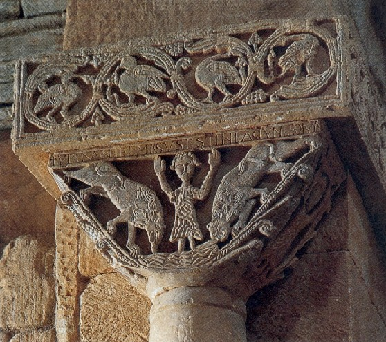 date du cliché : mars 2001